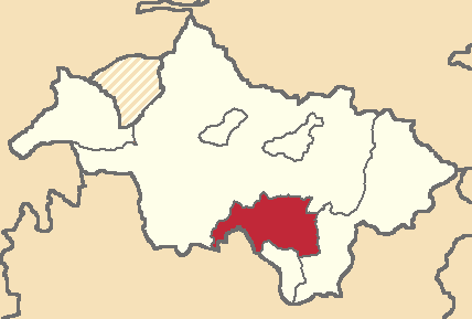 Mapa localizacor del cantón en Cañar, Ecuador